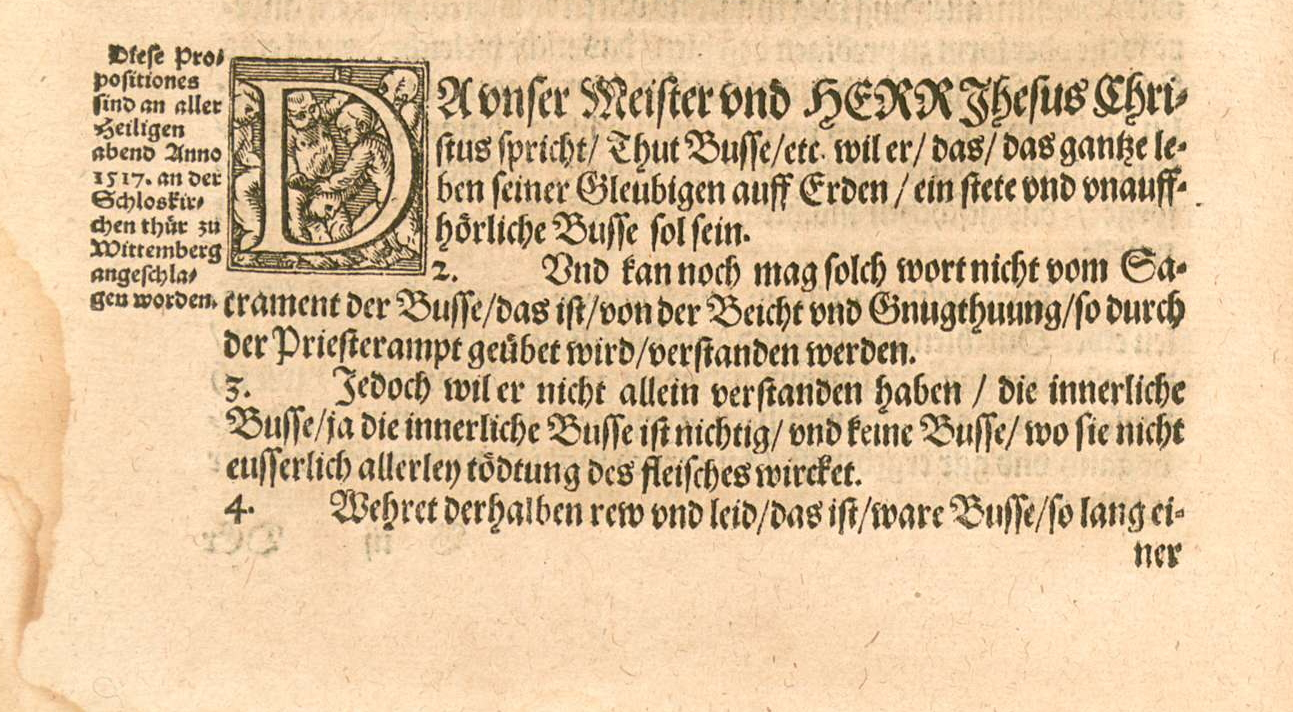 Erster Druck der deutschen Fassung der 95 Thesen. 1557 Beginn des Textes.